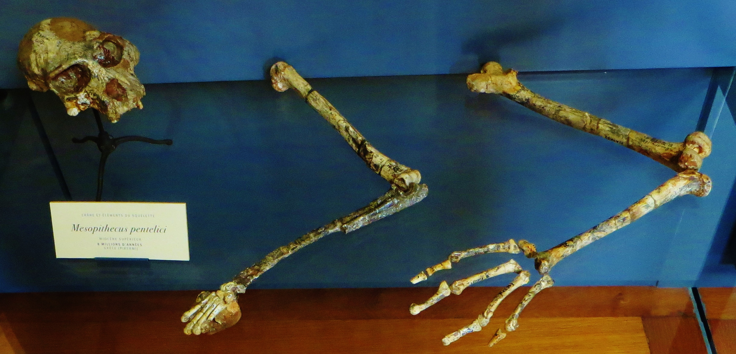 Fossil of Mesopithecus, an extinct mammal- Took the photo at Musee d'Histoire Naturelle, Paris